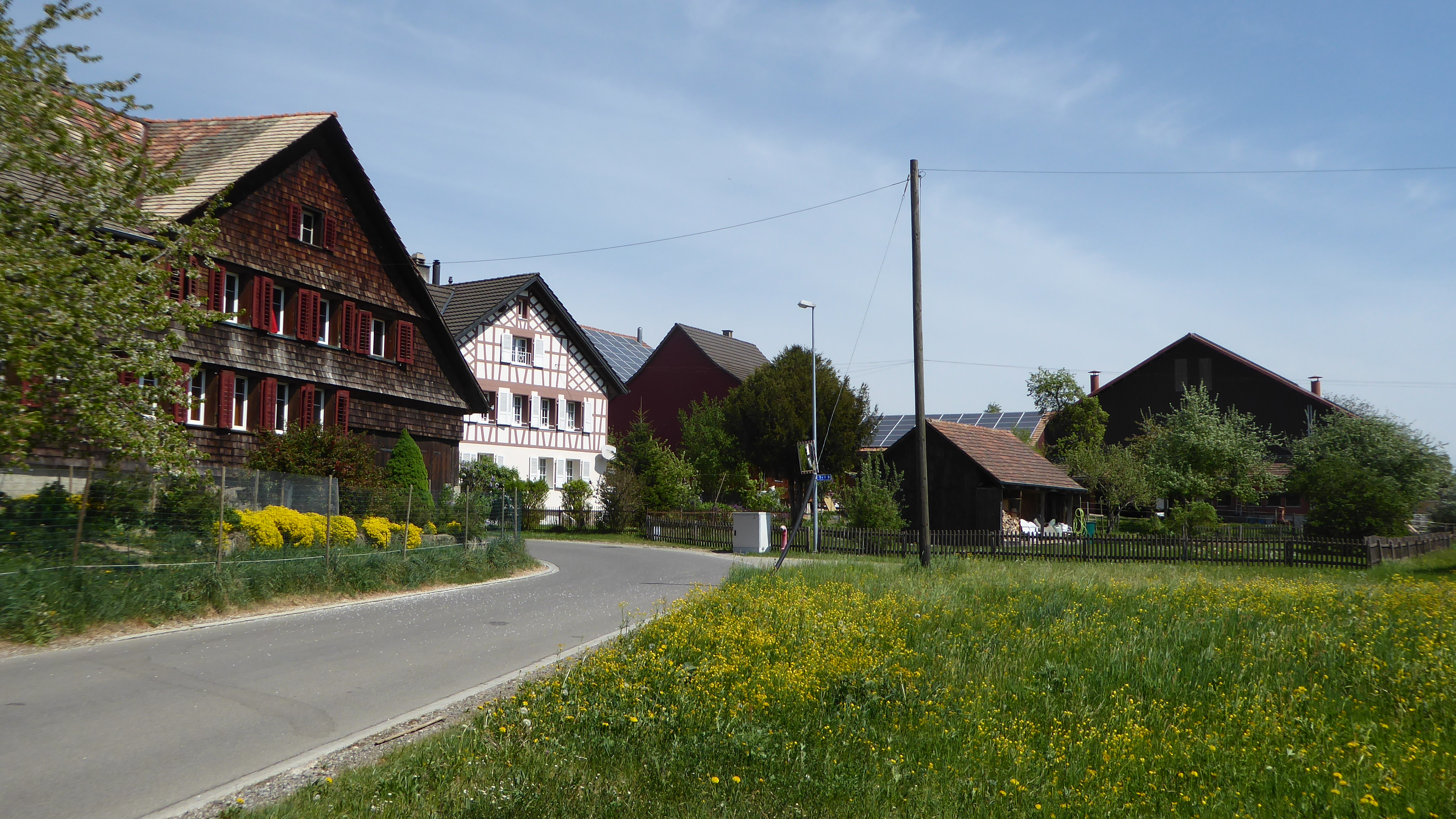 Buch bei Märwil, Ortseingang